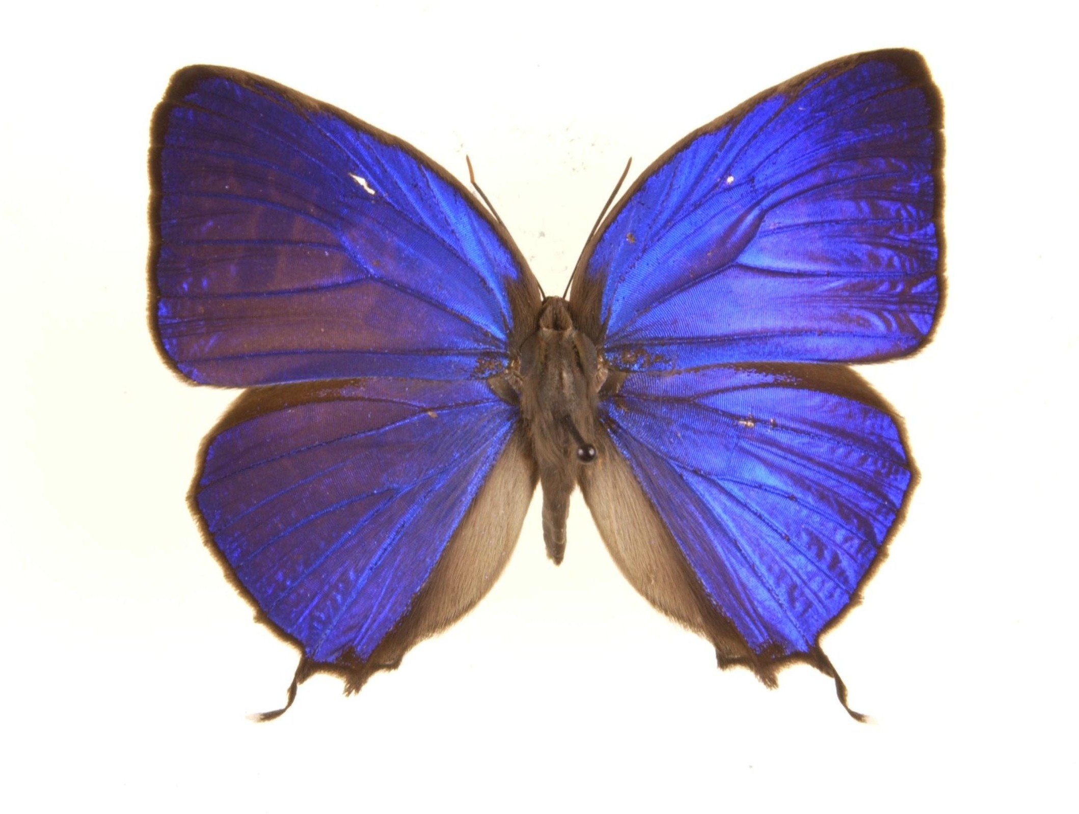 Arhopala anthelus Malaya